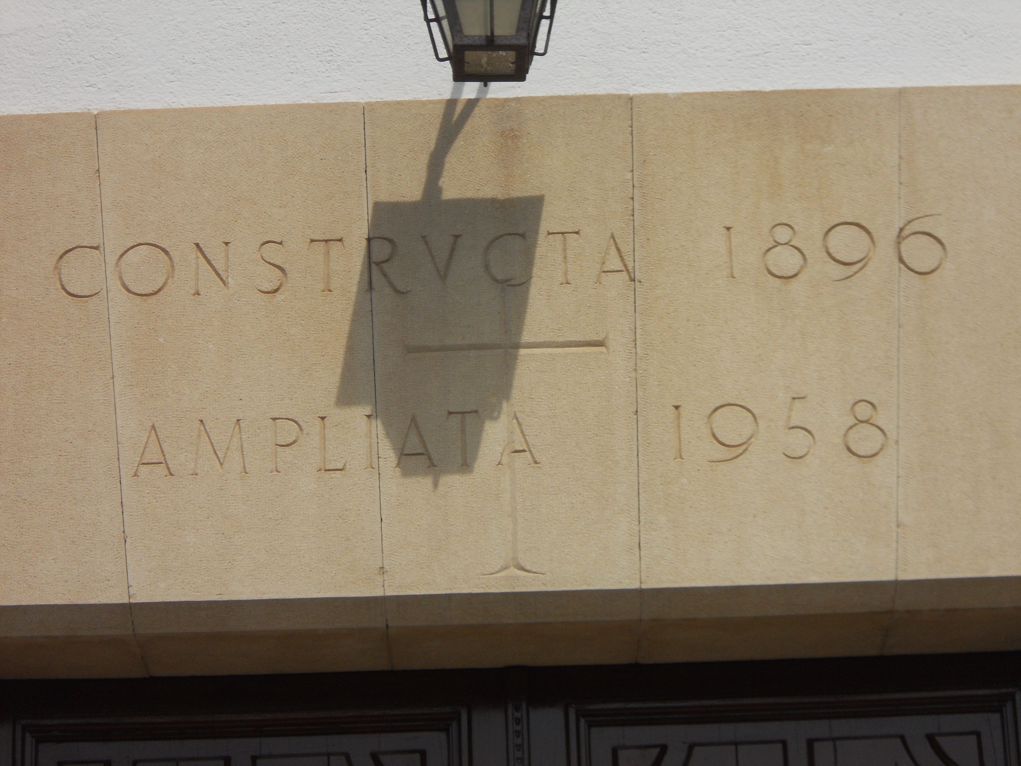 Església de Santa Rosa de Lima, a Llafranc (Baix Empordà).